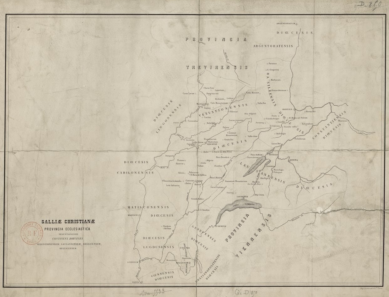 Carte de l'ancienne province ecclésiastique de Besançon, insérée dans la Gallia Christiana (1860).